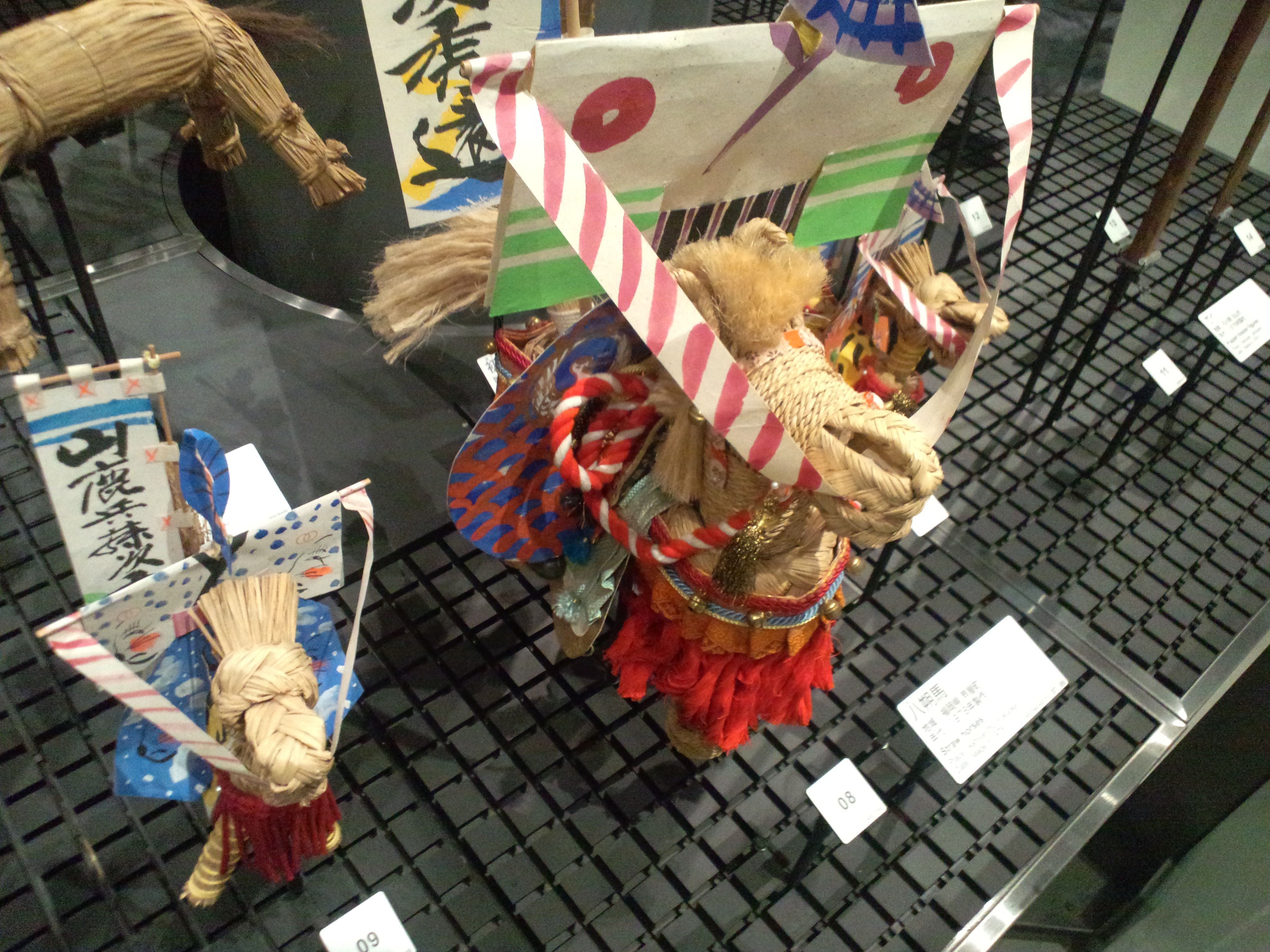 国立民族学博物館（大阪） 八朔馬「はっさくうま」（福岡県、芦屋町、1978年製作）